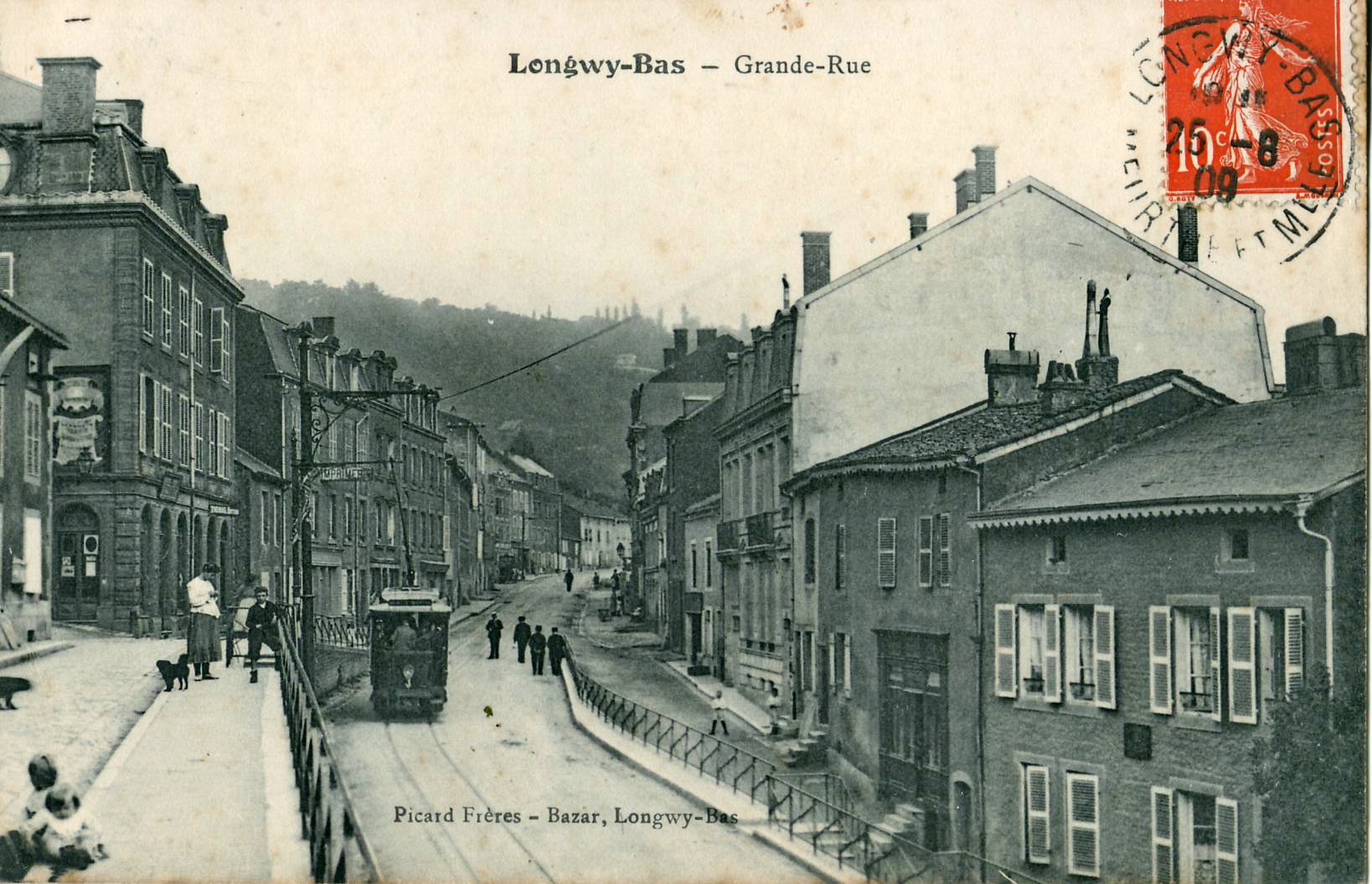 Carte postale ancienne éditée par Picard Frères, bazar à Longwy-bas : LONGWY-BAS - Grande Rue